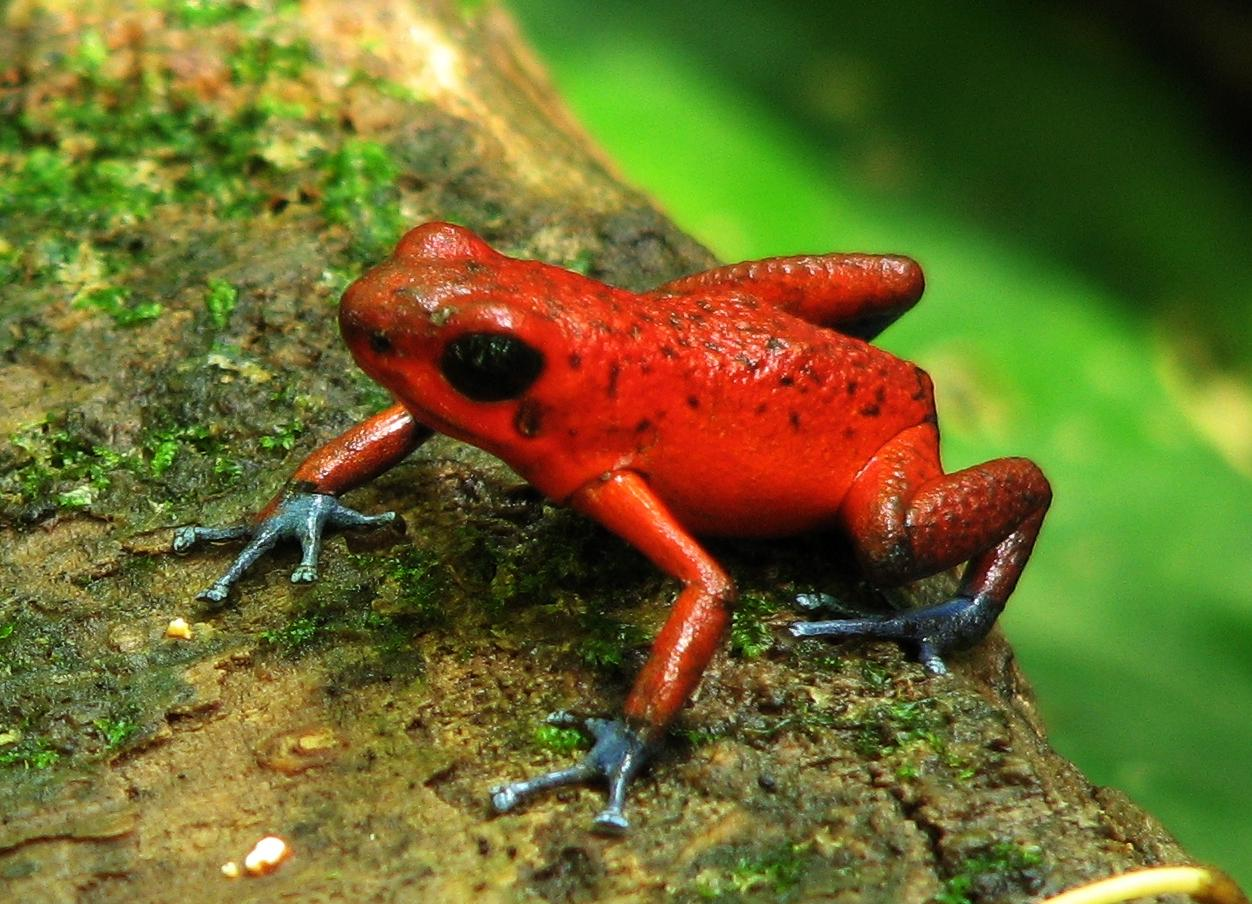 El sapo venenoso en El Cerro, Tortuguero, Costa Rica. ES:Sapo venenoso; EN:Strawberry poison frog